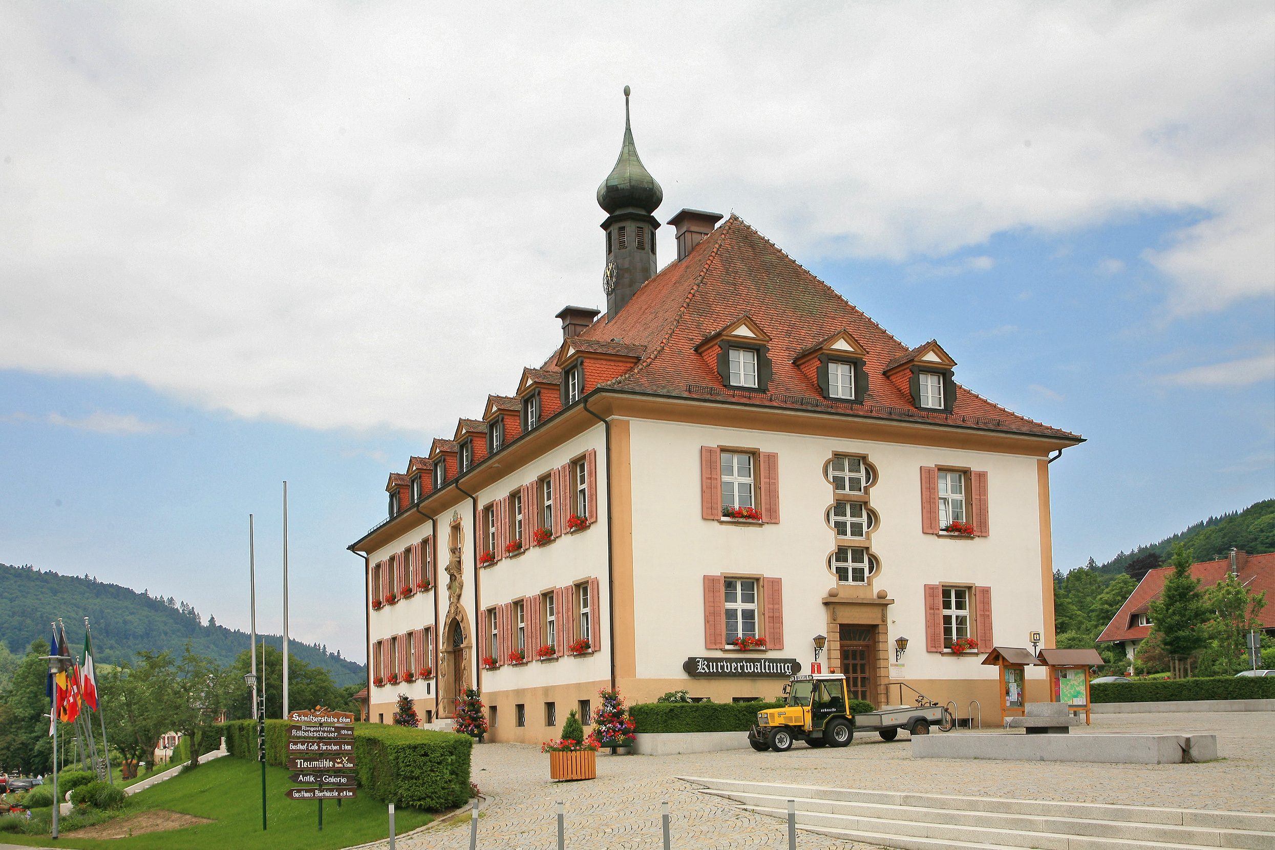 Rathaus - Münstertal/Schwarzwald ist eine Gemeinde im Landkreis Breisgau-Hochschwarzwald